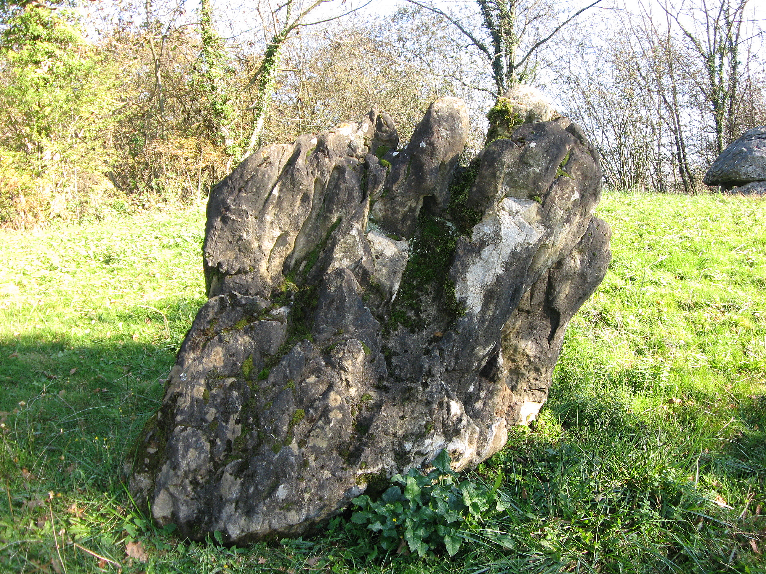 Rocher près du dolmen de Buzy (Pyrénées-Atlantiques) (Pyrénées).